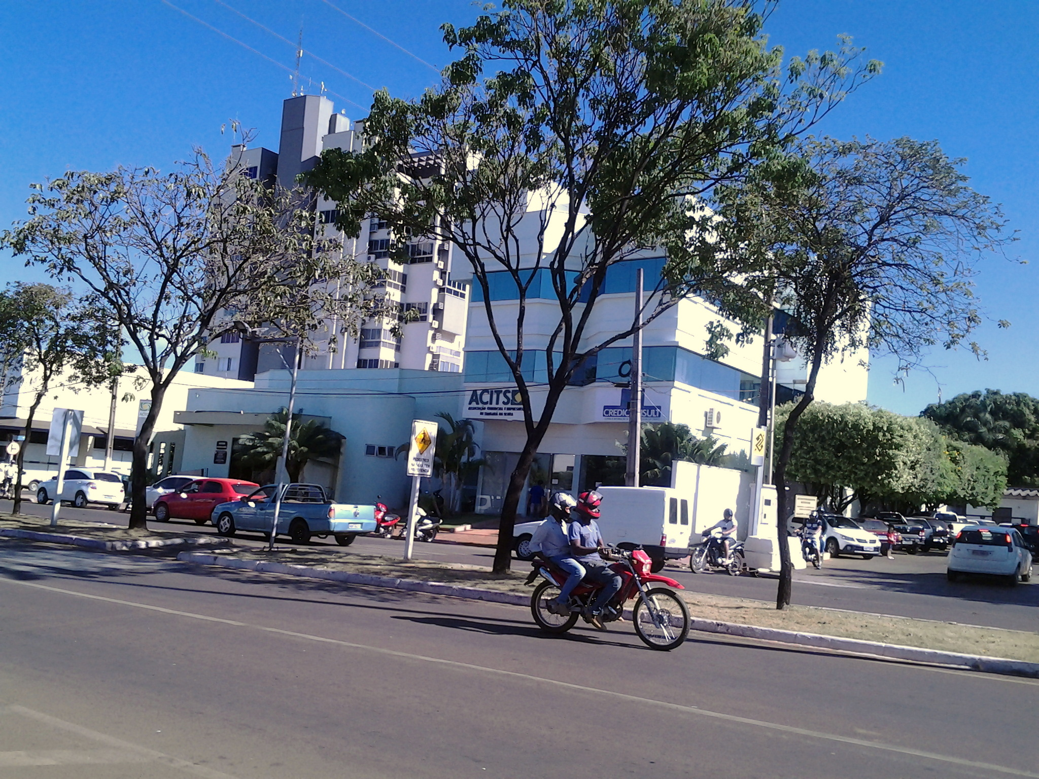 Prédio da ACITS, situado à Avenida Presidente Tancredo Neves, em Tangará da Serra.